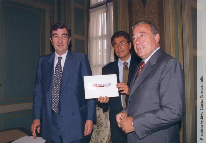 Presidente, Amministratore Delegato e Segretario Generale di Telecom Italia presentano alla stampa il logo dell'azienda